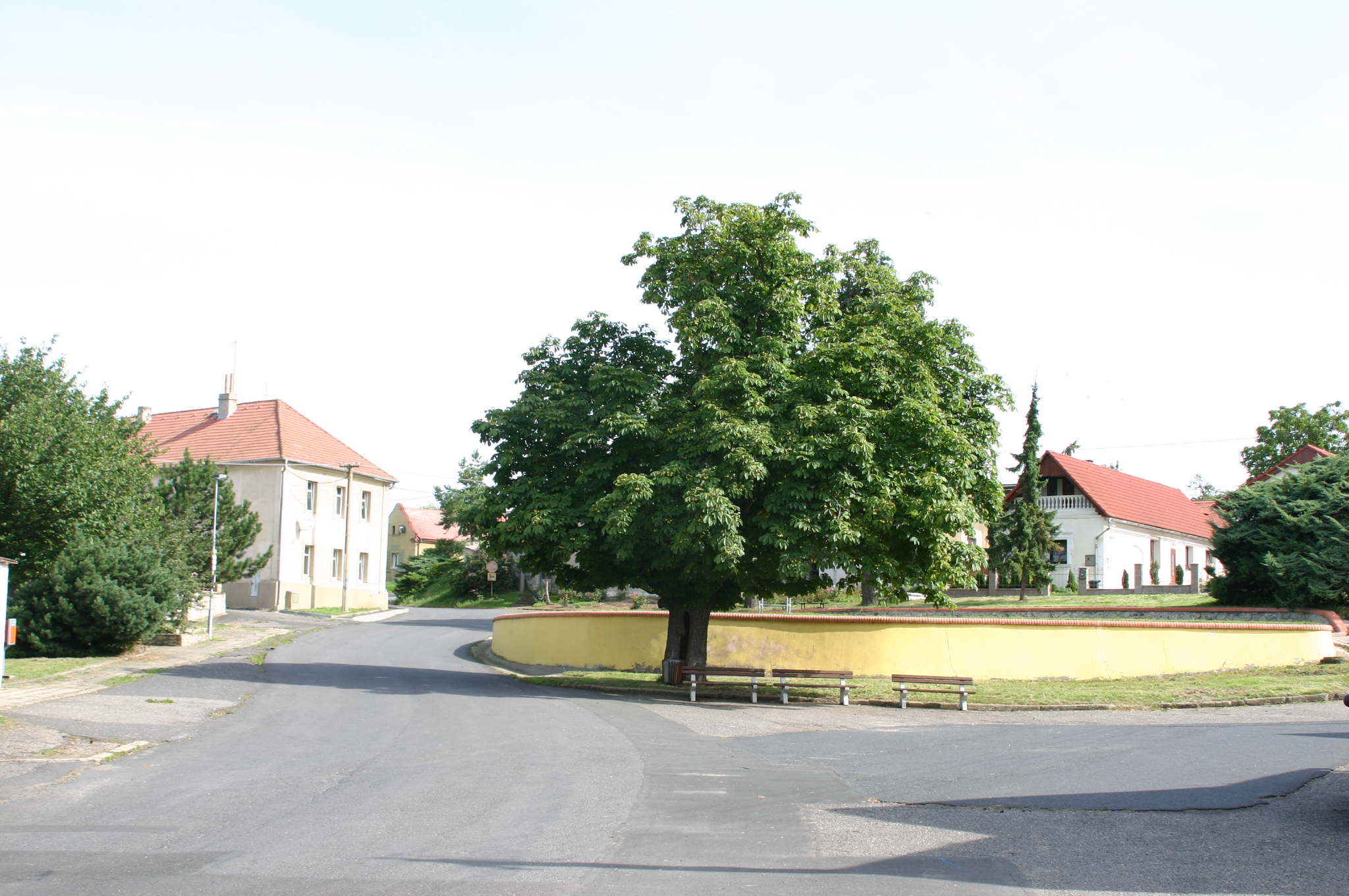 Obec Skršín v okrese Most (náves)